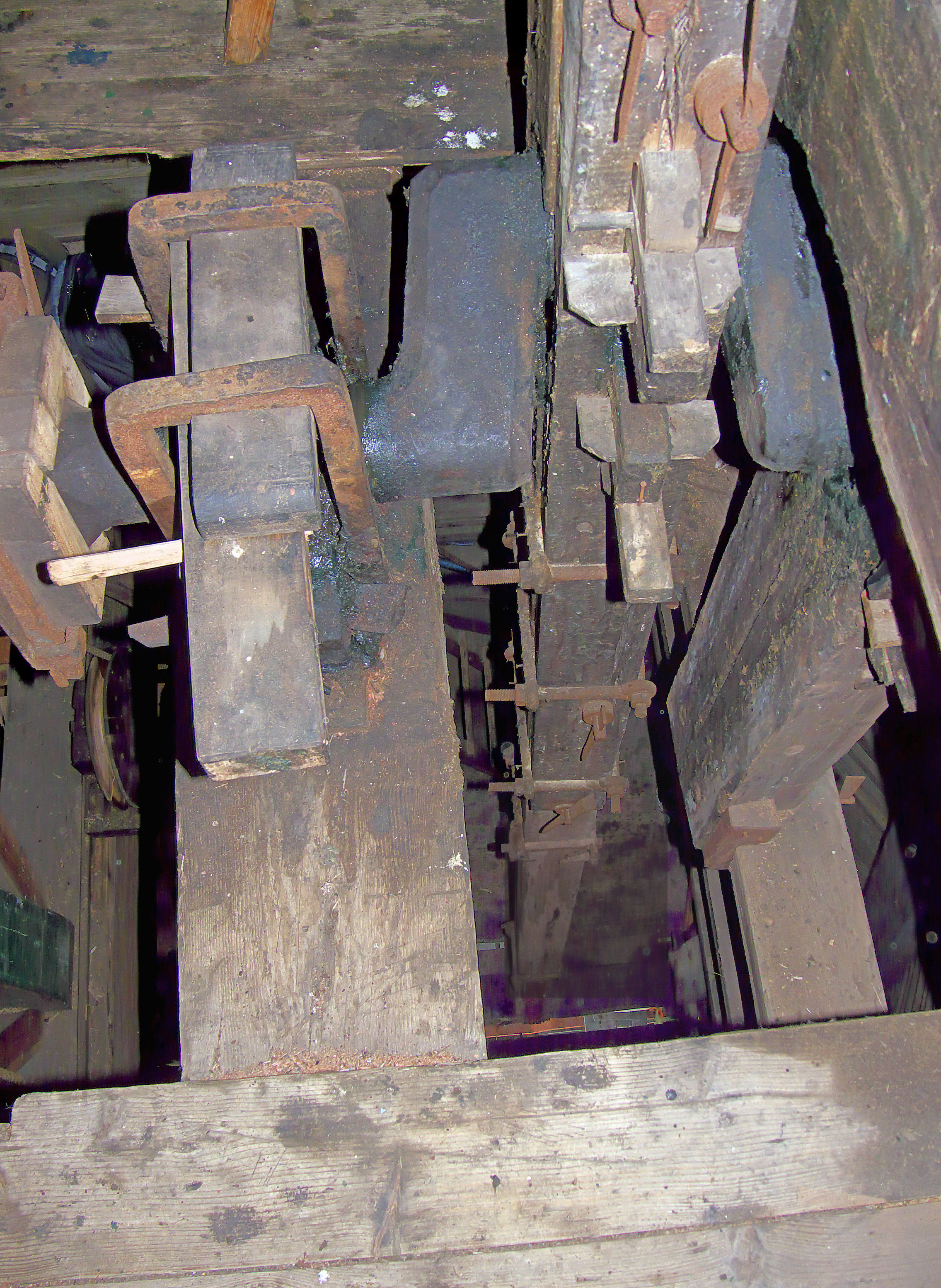 Molen De Gekroonde Poelenburg, wuifelaar aan krukas